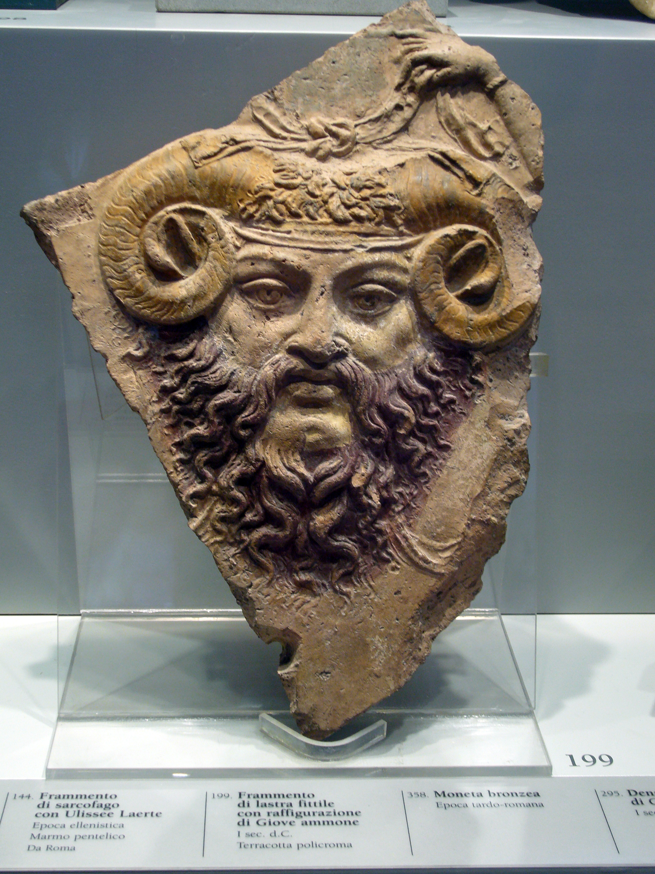 Roma, Museo Barracco: Giove Ammone. Frammento di lastra di terracotta del sec. 1 d.C. con cospicui resti della policromia originale.